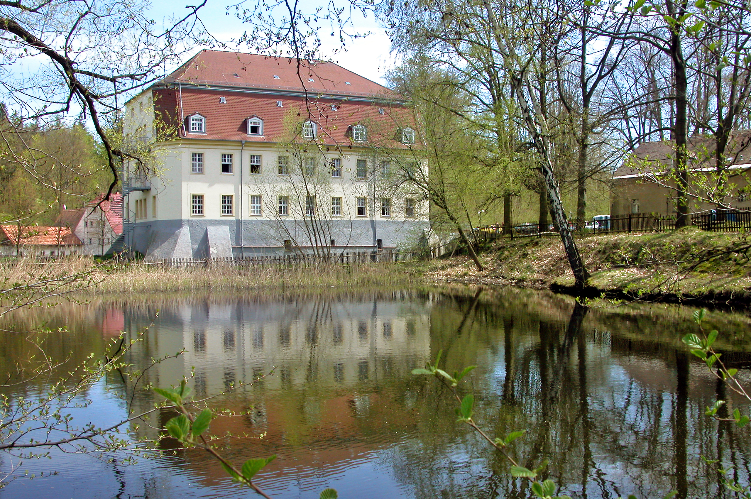 28.04.2008 02747 Ruppersdorf (Herrnhut), Untere Dorfstraße 56 (GMP: 51.006284,14.742311: Das alte Wasserschloß Niederruppersdorf brannte 1687 und evtl. nochmals 1752 ab. Herr von Nostitz ließ das Haus 1752 nach Plänen von Andreas Hüningen wieder aufbauen. 1930 verkaufte Hans von Treba das Schloß an die Stadt Löbau. 1938-1945 wurde das Schloß vom "Bund Deutscher Osten" als Grenzlandschule geführt. 1945 bis 1947 wohnten hier Umsiedler. Seit 1948 wurde die Anlage Landkreis Löbau-Zittau als Kinderheim genutzt. Heute Heim "Jugend mit einer Mission Herrnhut Strategic Frontiers Herrnhut". Sicht von SW. [DSCN32519.TIF]20080428430DR.JPG(c)Blobelt